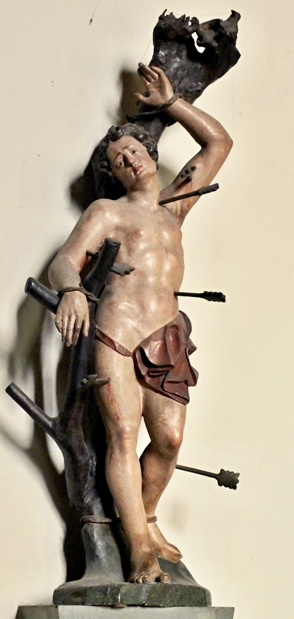 Statue des St. Sebastianus in der St. Jacobus Kirche, Hilden